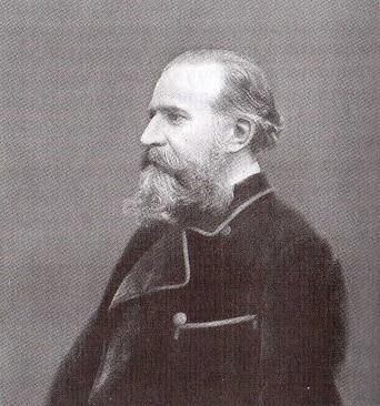 Пётр Арка́дьевич Кочубе́й (1825-1892) - почётный член Петербургской Академии Наук (1876), председатель Русского технического общества.